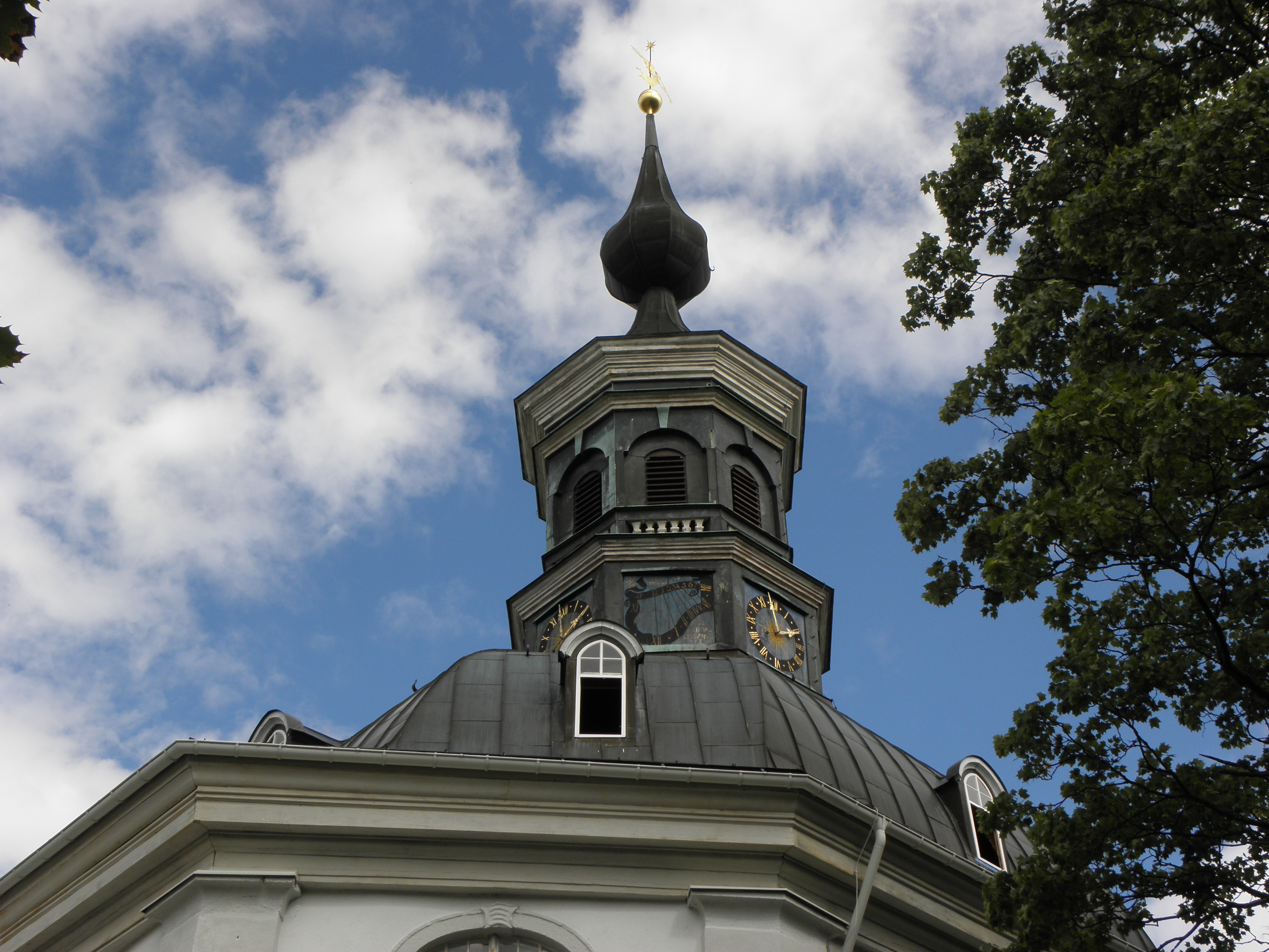 Carlsfeld, Trinitatiskirche, Außenansicht